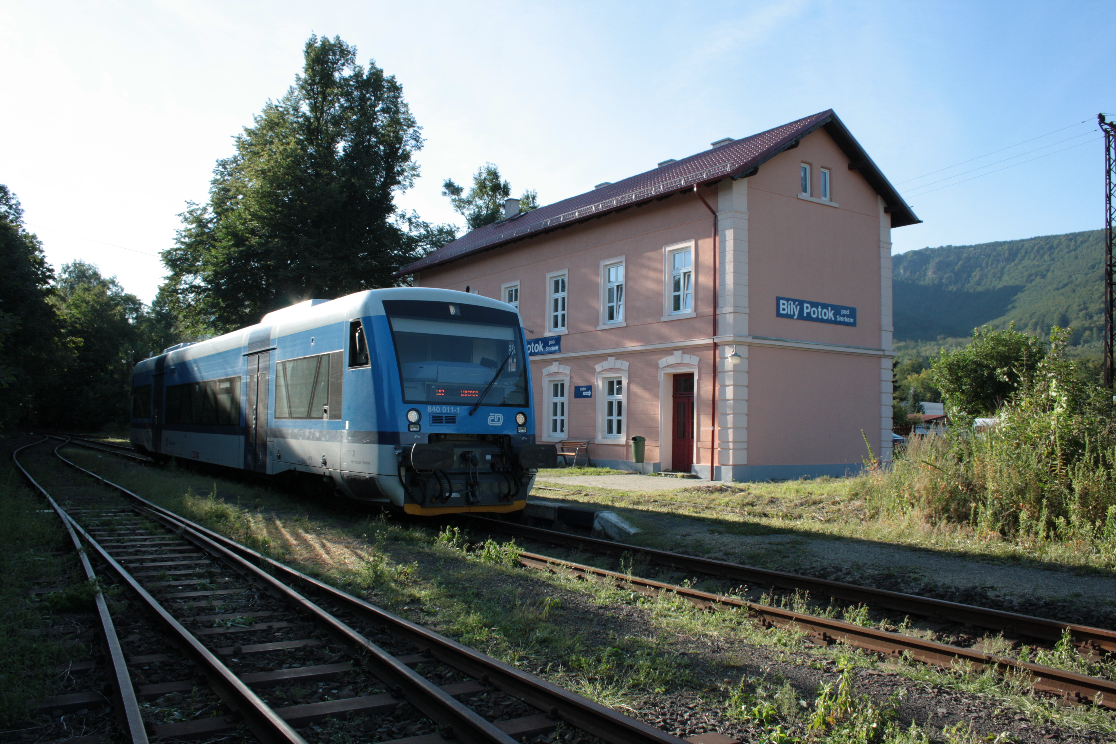 This photograph was taken with a DSLR from WMCZ's Camera grant. Staniční budova železniční zastávky Bílý Potok pod Smrkem se soupravou vlaku ČD Class 840 (pohled ze severozápadu).